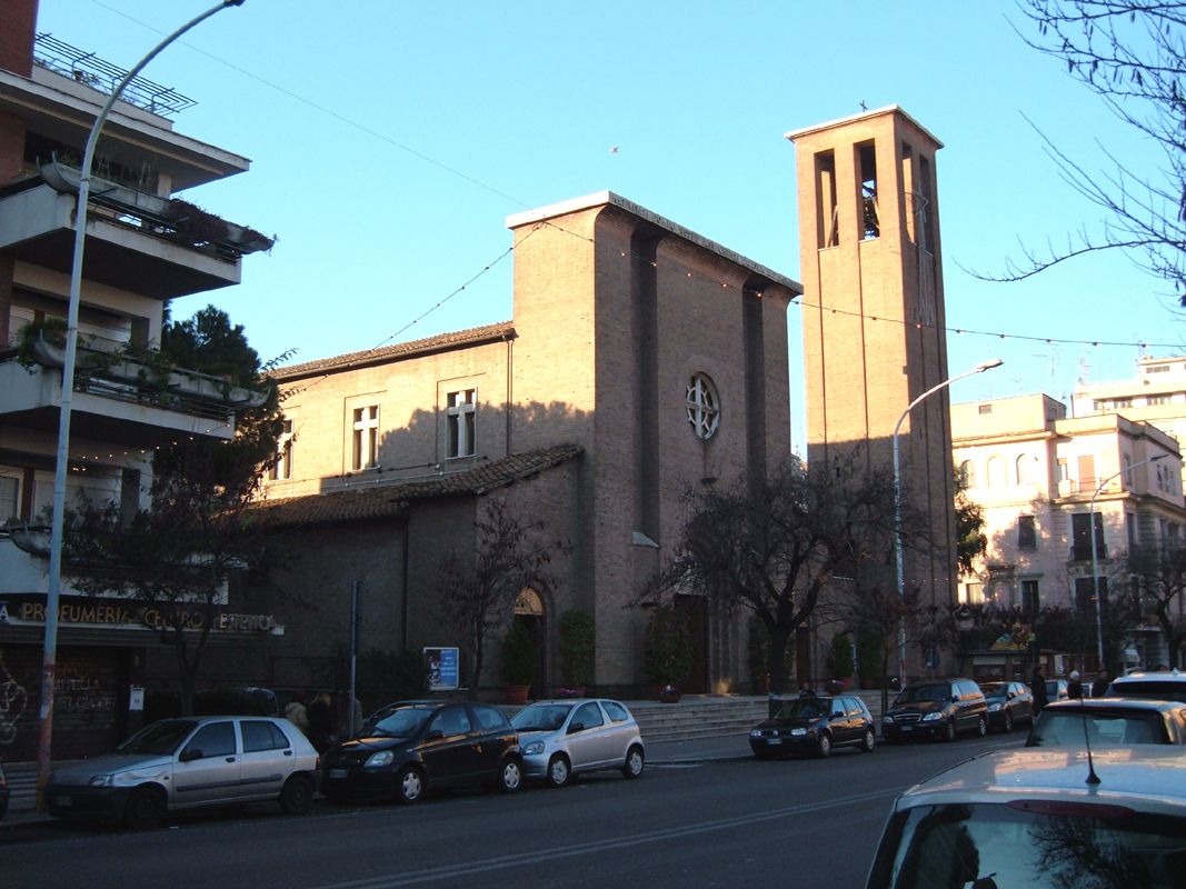 Chiesa della Natività di Nostro Signore Gesù Cristo, a Roma, nel quartiere Appio Latino.